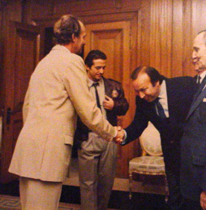 Paco Cepero com o Rei Juan Carlos I da Espanha